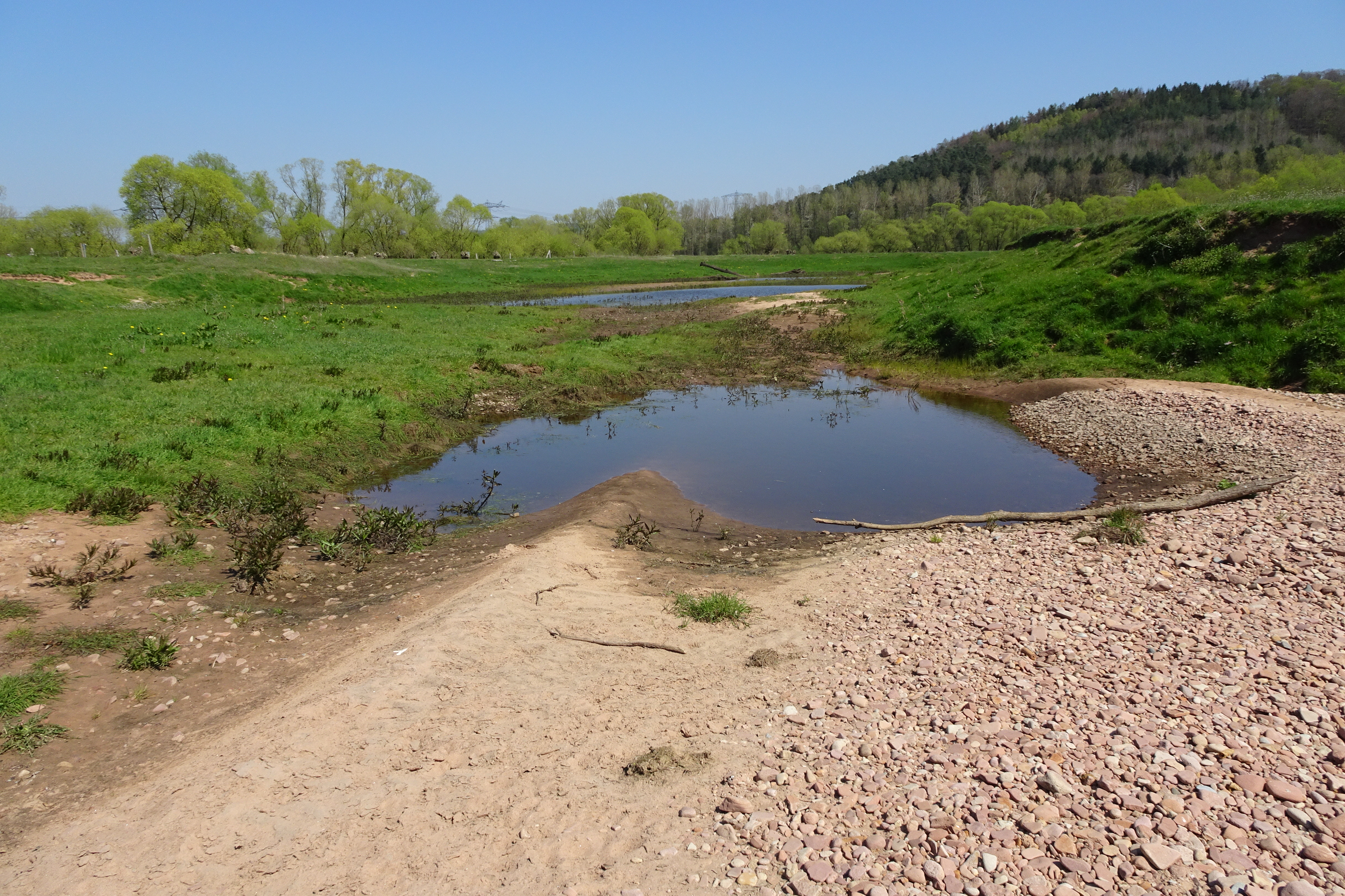 Die „Alte Fulda bei Blankenheim“ ist ein Altwasserbiotop am Mittellauf der Fulda nordöstlich der Gemeinde Blankenheim, einem Stadtteil von Bebra im Landkreis Hersfeld-Rotenburg. Als regional bedeutende Lebensstätte brütender und „Trittstein" für durchziehende Vogelarten ist der im Dezember 1981 zum Naturschutzgebiet erklärte Bereich aus ornithologischer Sicht von großer Bedeutung. Das Naturschutzgebiet liegt vollständig in dem Flora-Fauna-Habitat-Gebiet 5024-305 „Auenwiesen von Fulda, Rohrbach und Solz“, EU-Vogelschutzgebiet 5024-401 „Fuldatal zwischen Rotenburg und Niederaula“ und Landschaftsschutzgebiet „Auenverbund Fulda“. This is a picture of the protected area listed at WDPA under the ID 81266